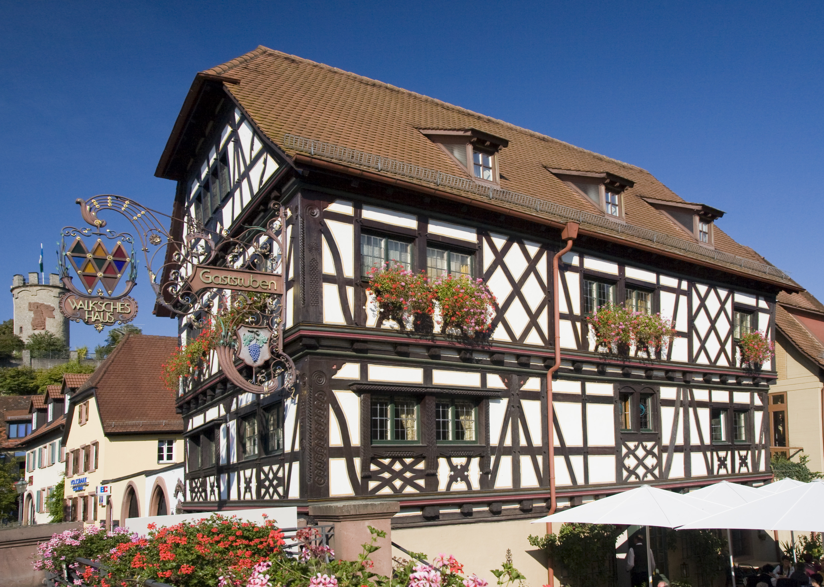 Walk´sches Haus im badischen Weingarten